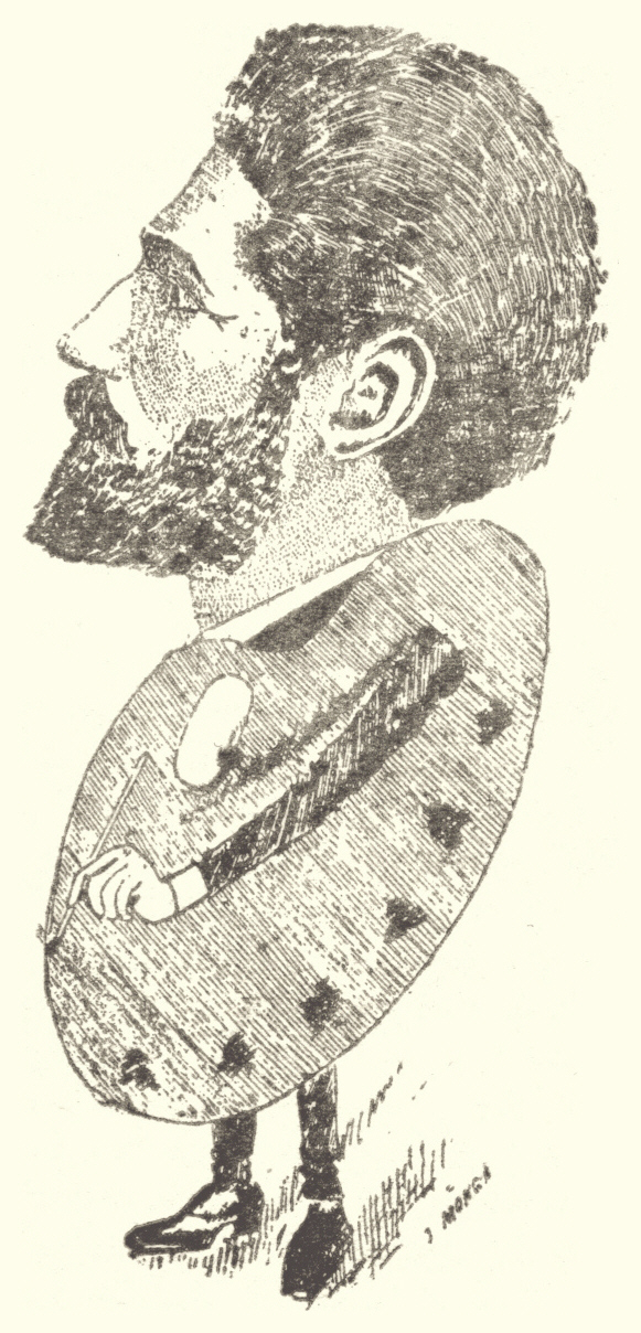 Autocaricatura del escritor uruguayo José Alonso y Trelles (1857 - 1924).